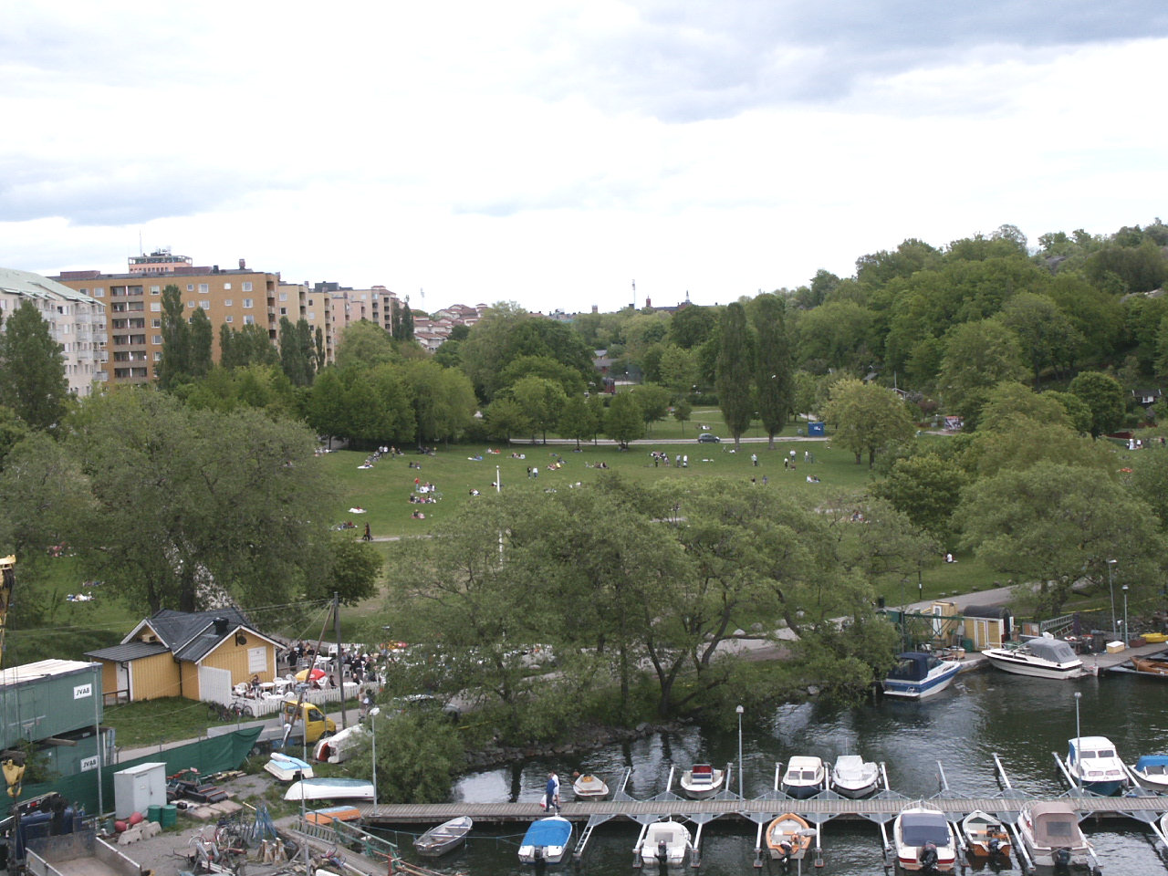 Tantolunden, Stockholm, Sweden.